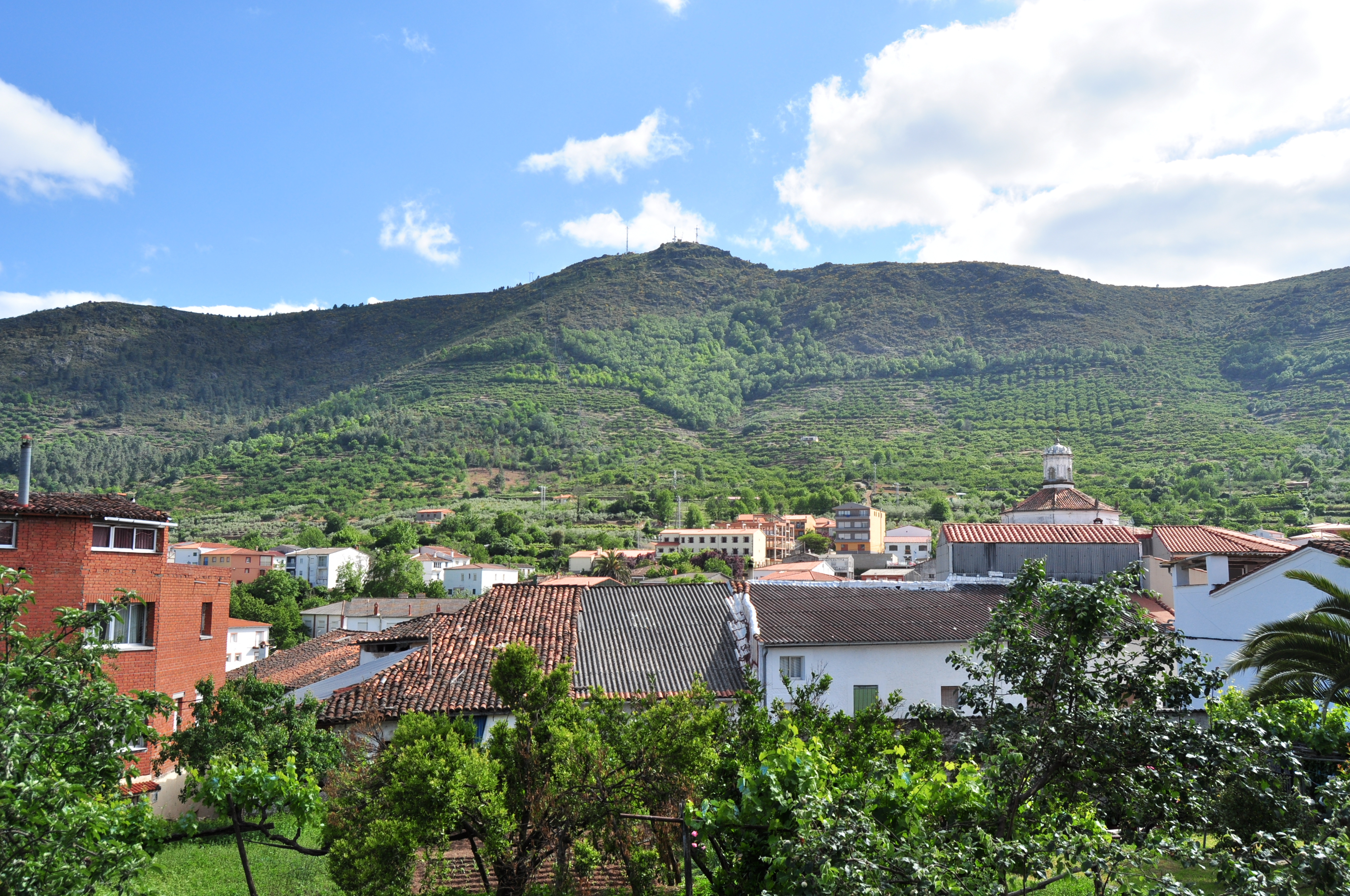 Casar de Palomero - 001